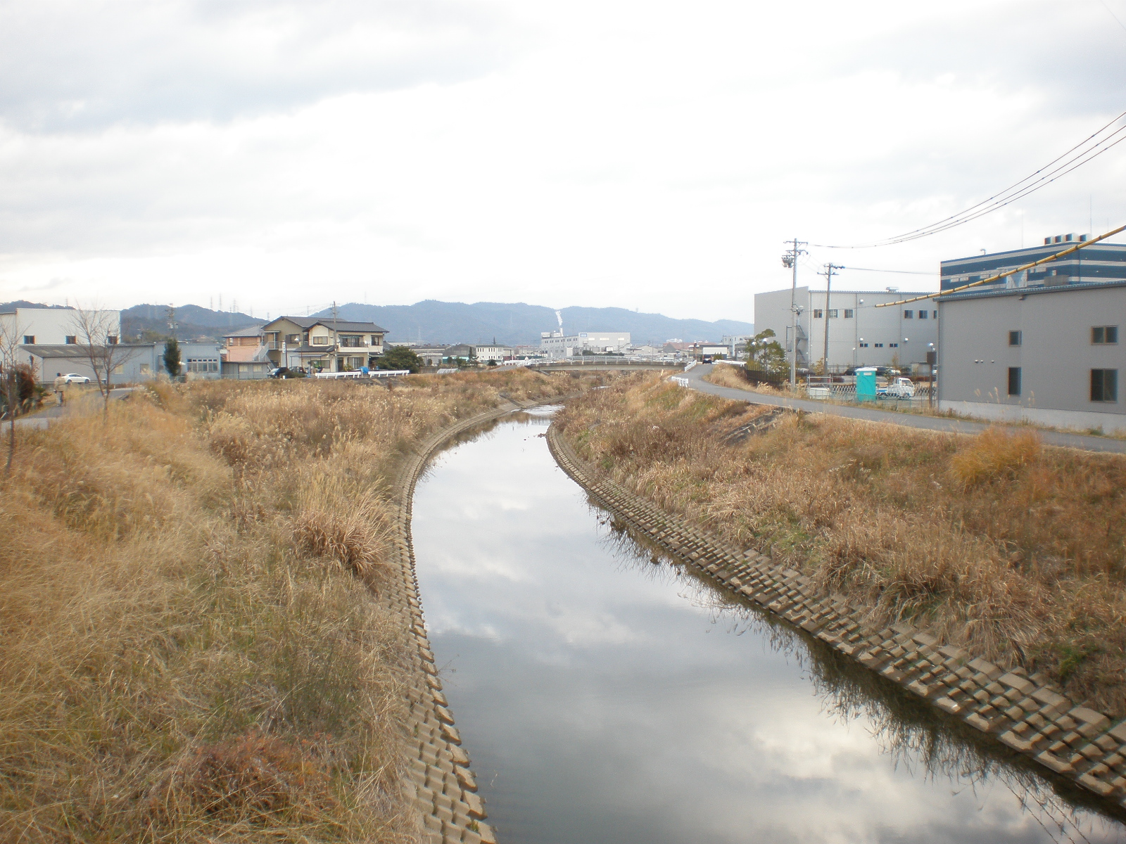 愛知県北部を流れる大山川（撮影場所：愛知県小牧市大字本庄）